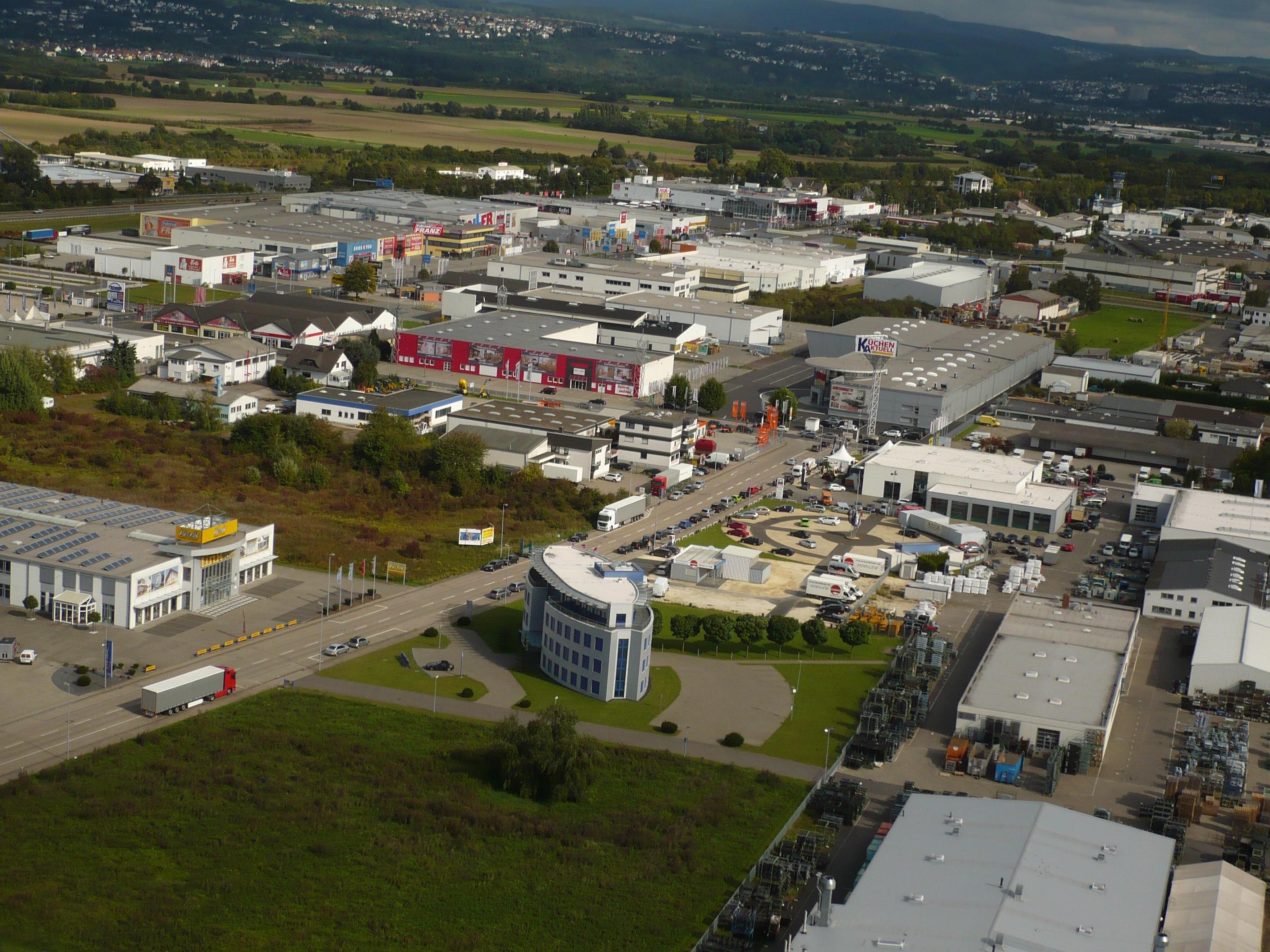 Luftaufnahmedes Industrie und Gewerbegebiets Mülheim-Kärlich